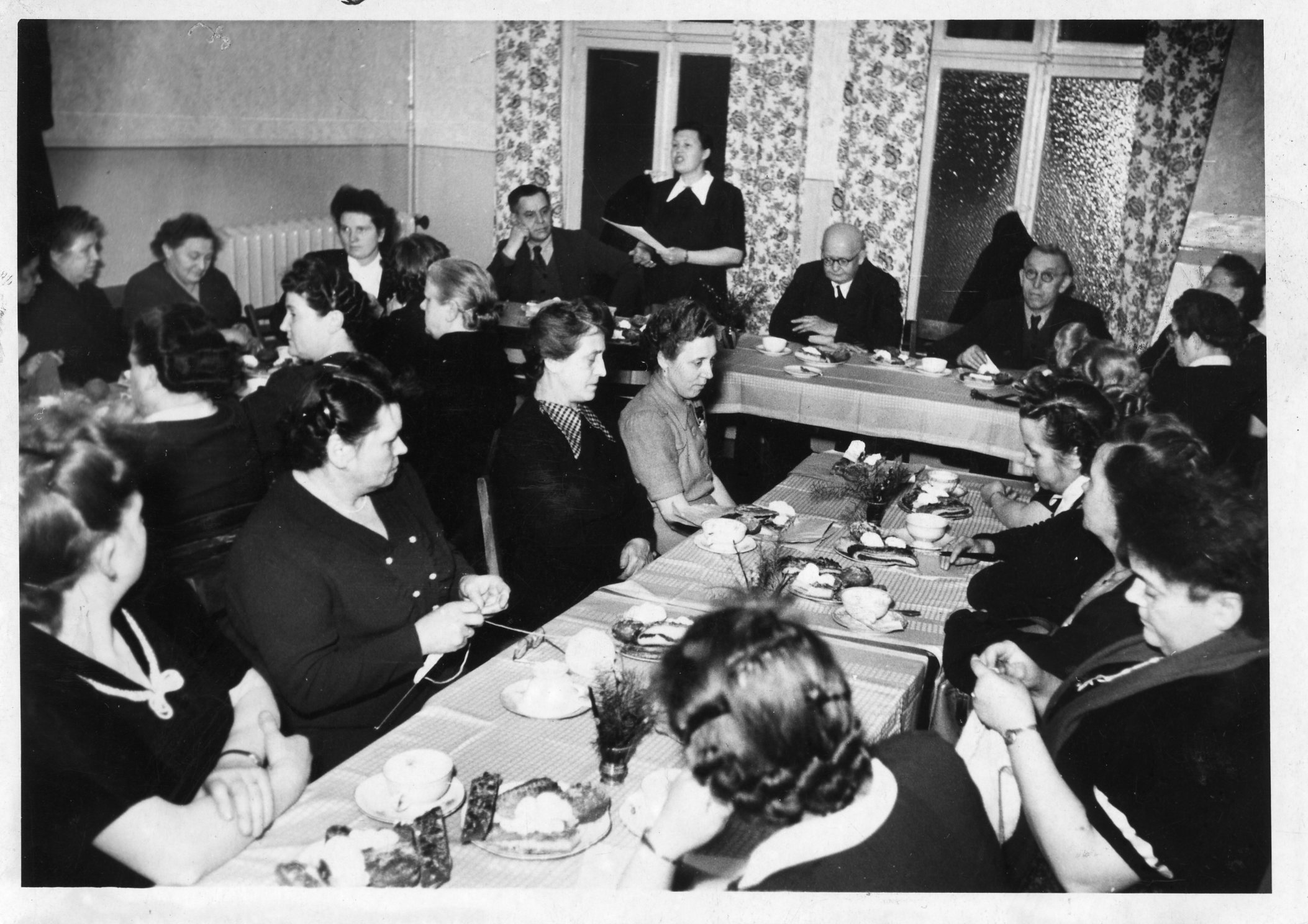 Rechenschafftsbericht 1951